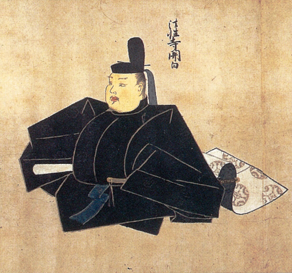 藤原忠通の肖像画。